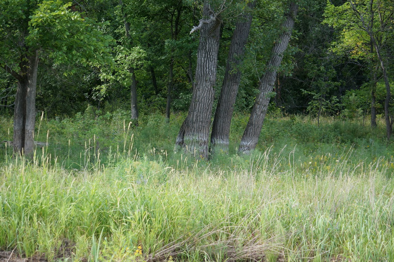 Отметка верхнего уровня воды при паводке на острове Серёдыш.